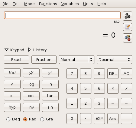 Capture de la fenêtre princiaple de Qalculate! Capture personnelle.